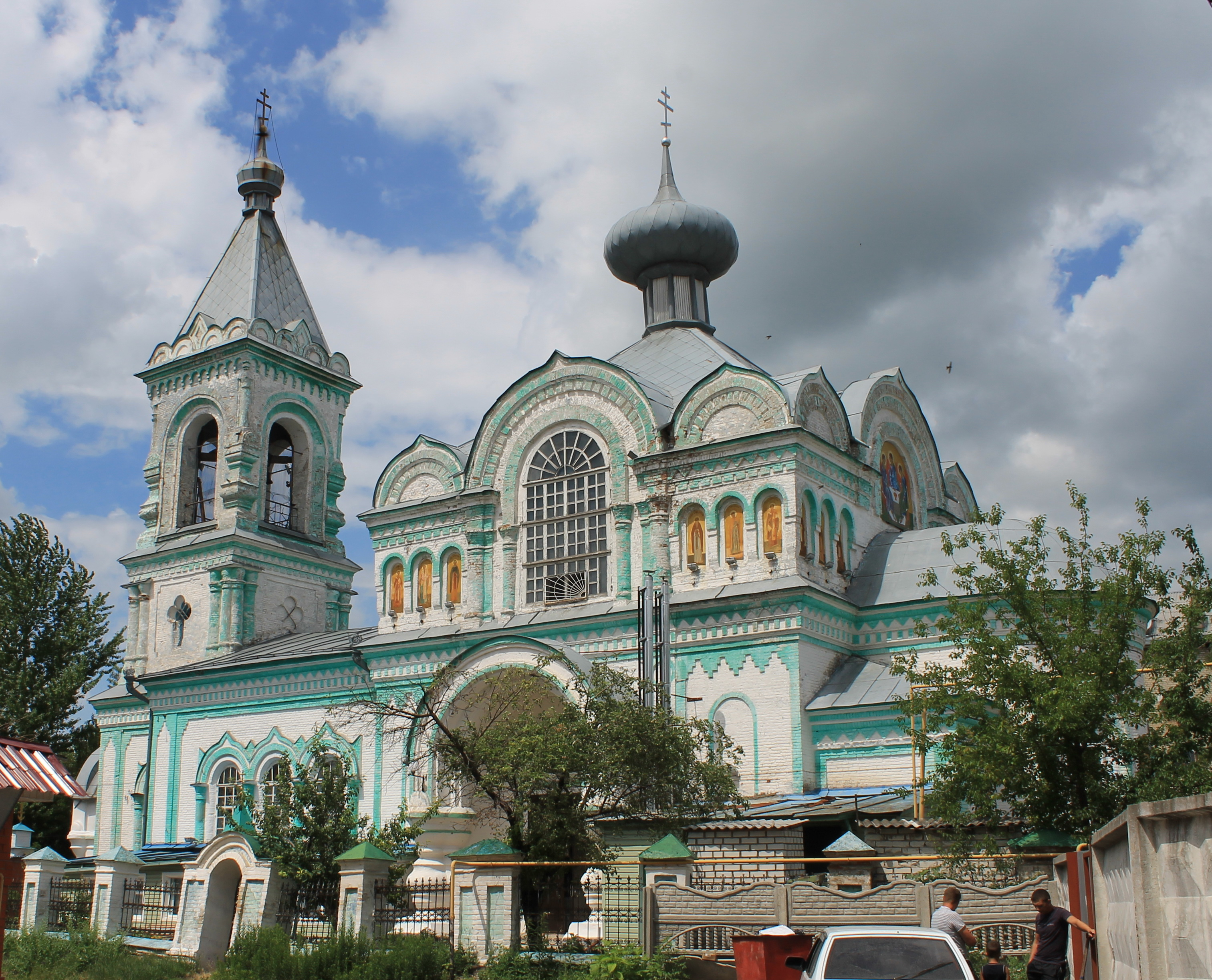 Православный храм Святителя Николая Чудотворца в городе Валуйки Белгородской области, расположенный по адресу Красная площадь, 7. Является самым древним сохранившимся строением в городе.